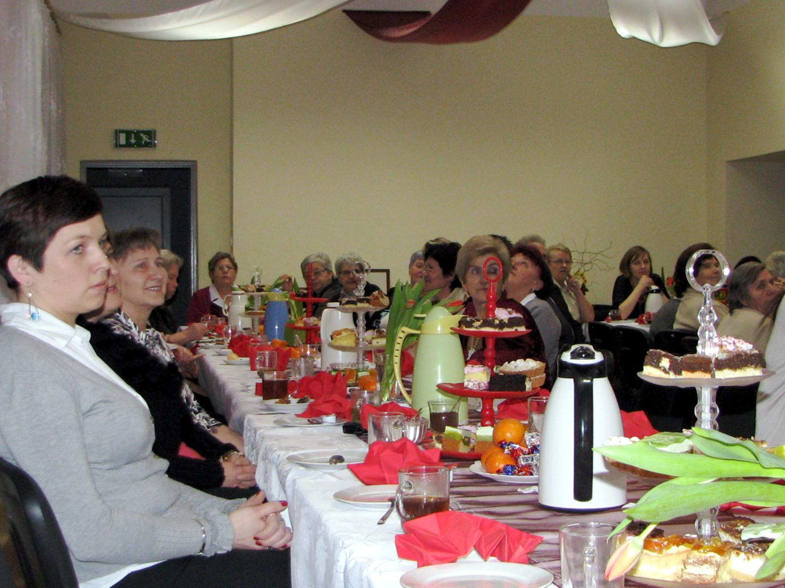 Wojcieszyce. Spotkanie z okazji Dnia Kobiet.